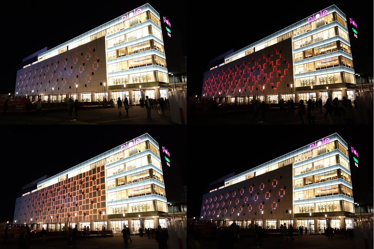 piole姫路 外壁の間接LED照明